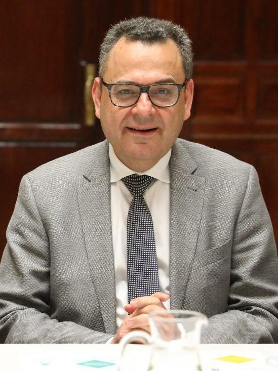 Madrid forma parte desde hoy de la Comunidad de Champions en Movilidad, la primera plataforma global de gobernantes locales para liderar la transición en la movilidad urbana y reforzar la defensa global de la movilidad sostenible. Promovida y coordinada por la Unión Internacional de Transporte Público (UITP) y Ciudades y Gobiernos Locales Unidos, (CGLU), esta comunidad integra a 30 ciudades de todo el mundo –Montreal, Estrasburgo, Bilbao, Ammán, La Paz, Yakarta…- que se han destacado por su apuesta decidida en la búsqueda de soluciones de movilidad urbana sostenible para todos. Estrasburgo ostenta la presidencia.